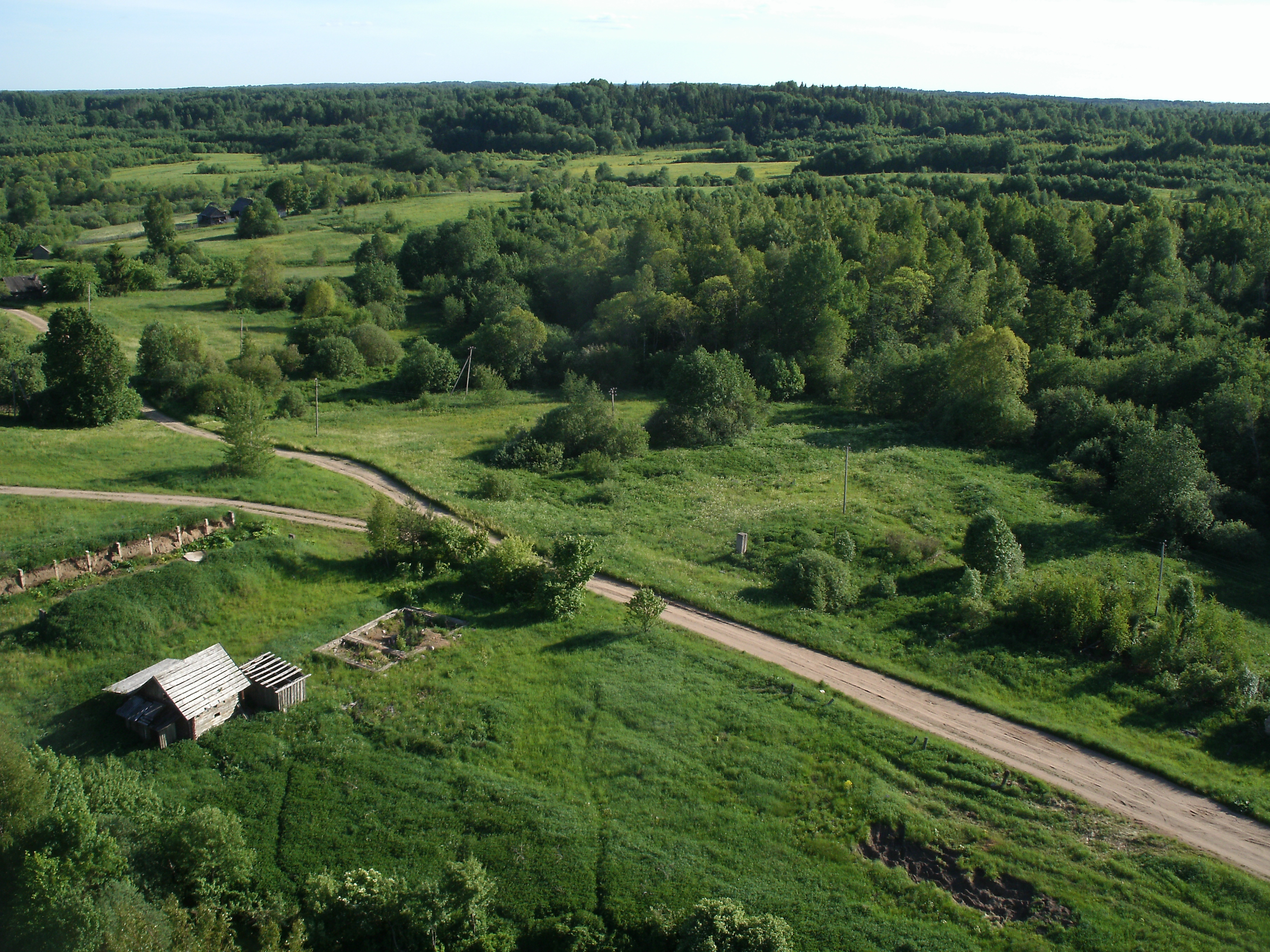 Nevelsky District, Pskov Oblast, Russia